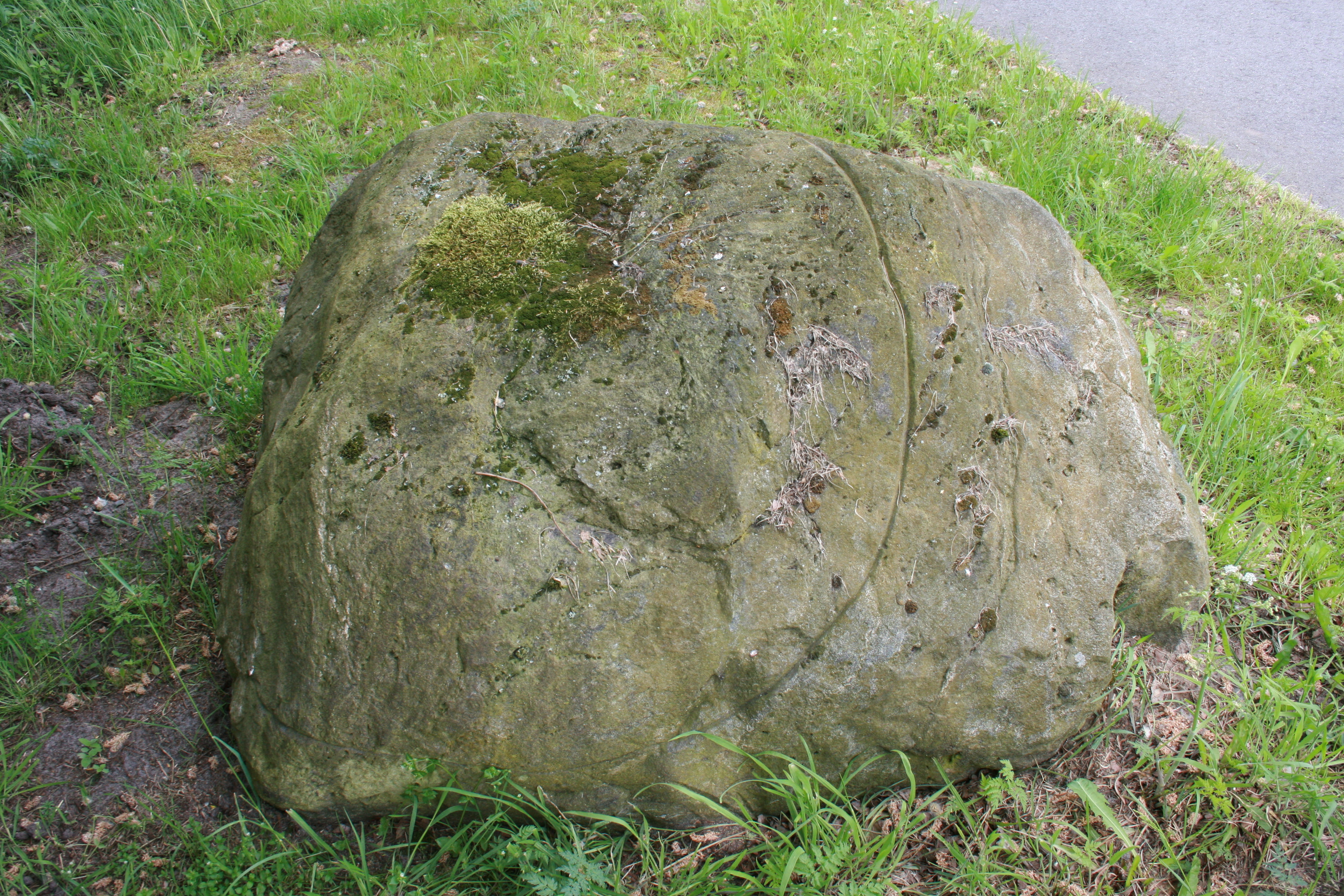 „Der innere Kreis der äußeren Linie folgend“, Skulptur von Christiane Möbus im Projekt Kunst-Landschaft des Kunstvereins Springhornhof in Neuenkirchen (Lüneburger Heide)